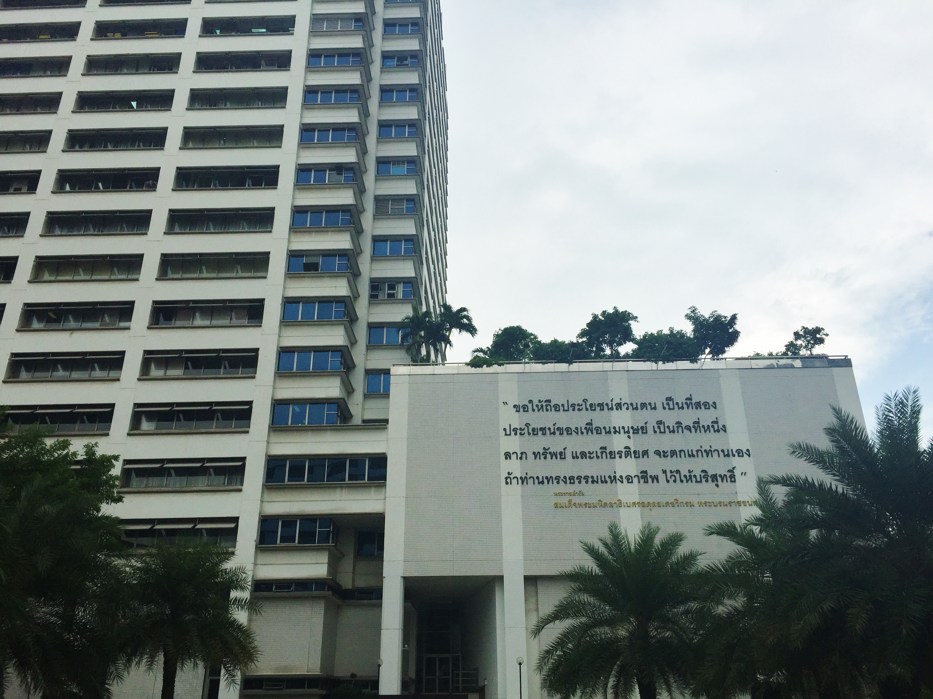 ตึก อปร หนึ่งในอาคารเรียนคณะแพทยศาสตร์ จุฬาฯ